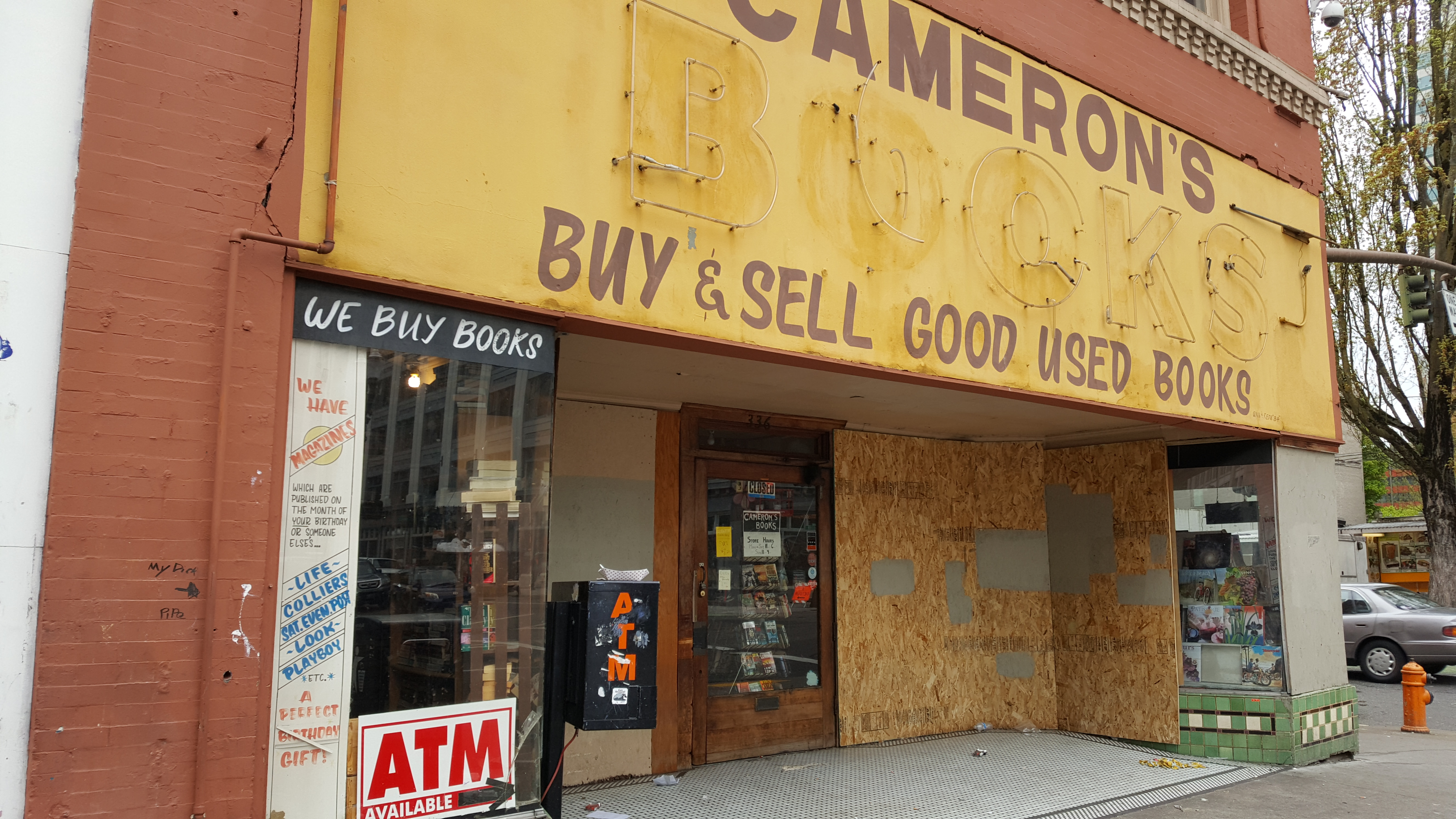 Cameron's